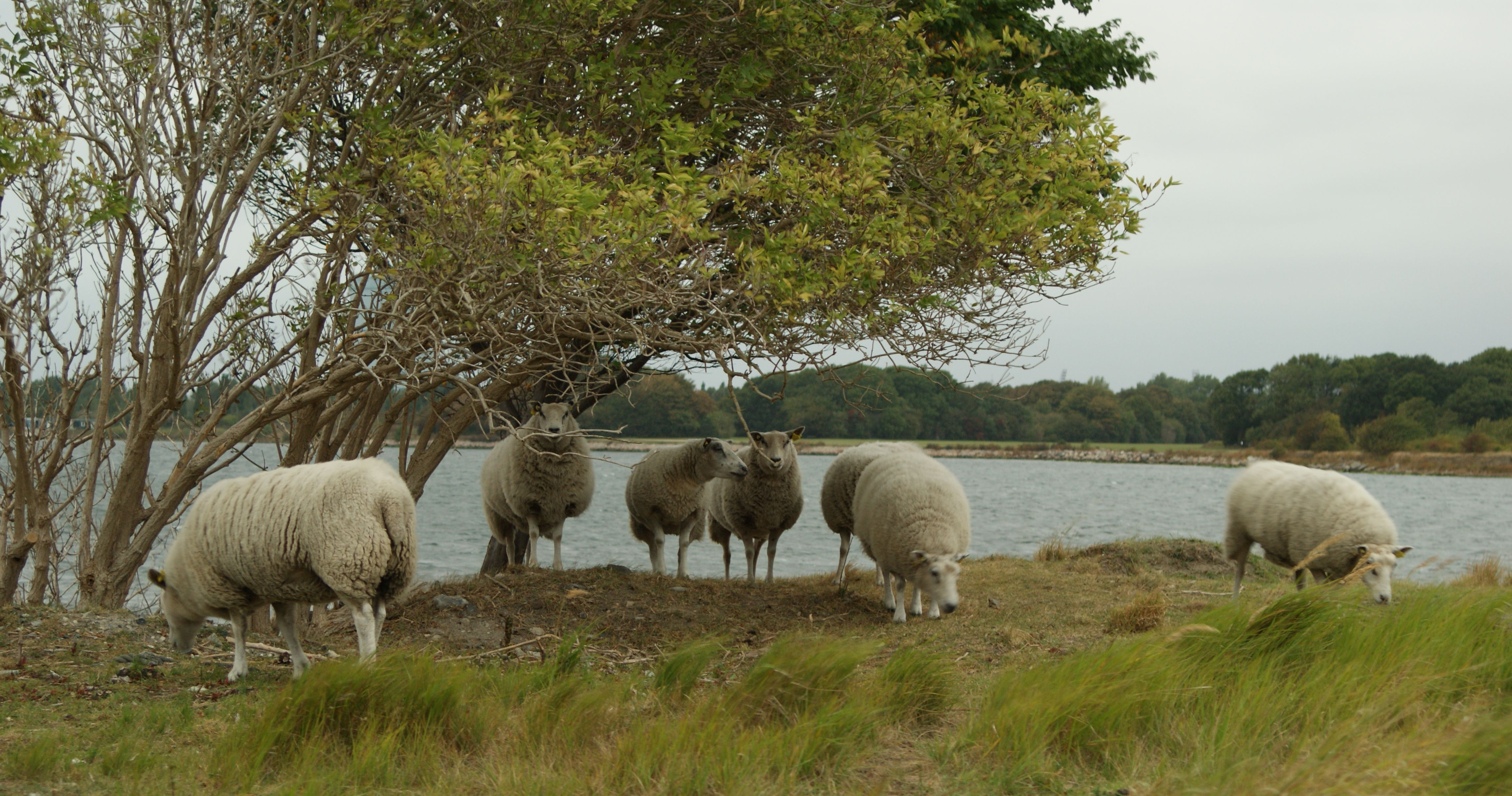 Copenhagen sheeps